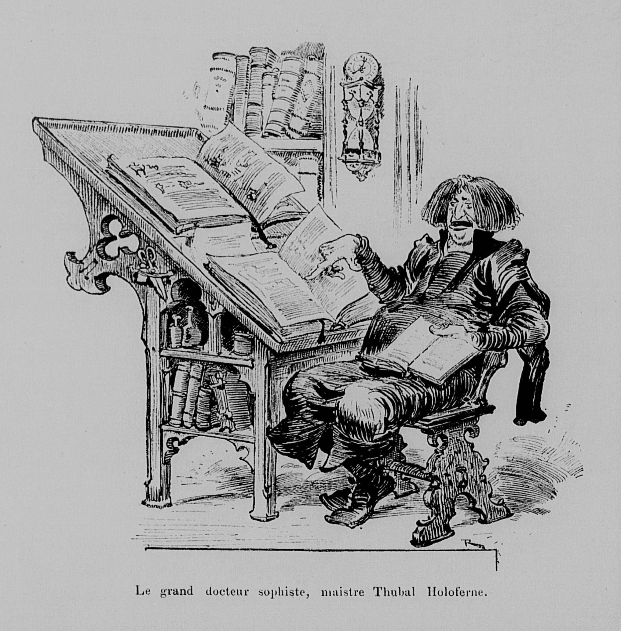 Tubal Holopherne est le premier précepteur de Gargantua et représente l'éducation sophiste décriée par les humanistes de la Renaissance. Gravure tirée du premier tome des Oeuvres illustrées de François Rabelais, publié vers les années 1880 (1885 ?) à la Librairie illustrée.